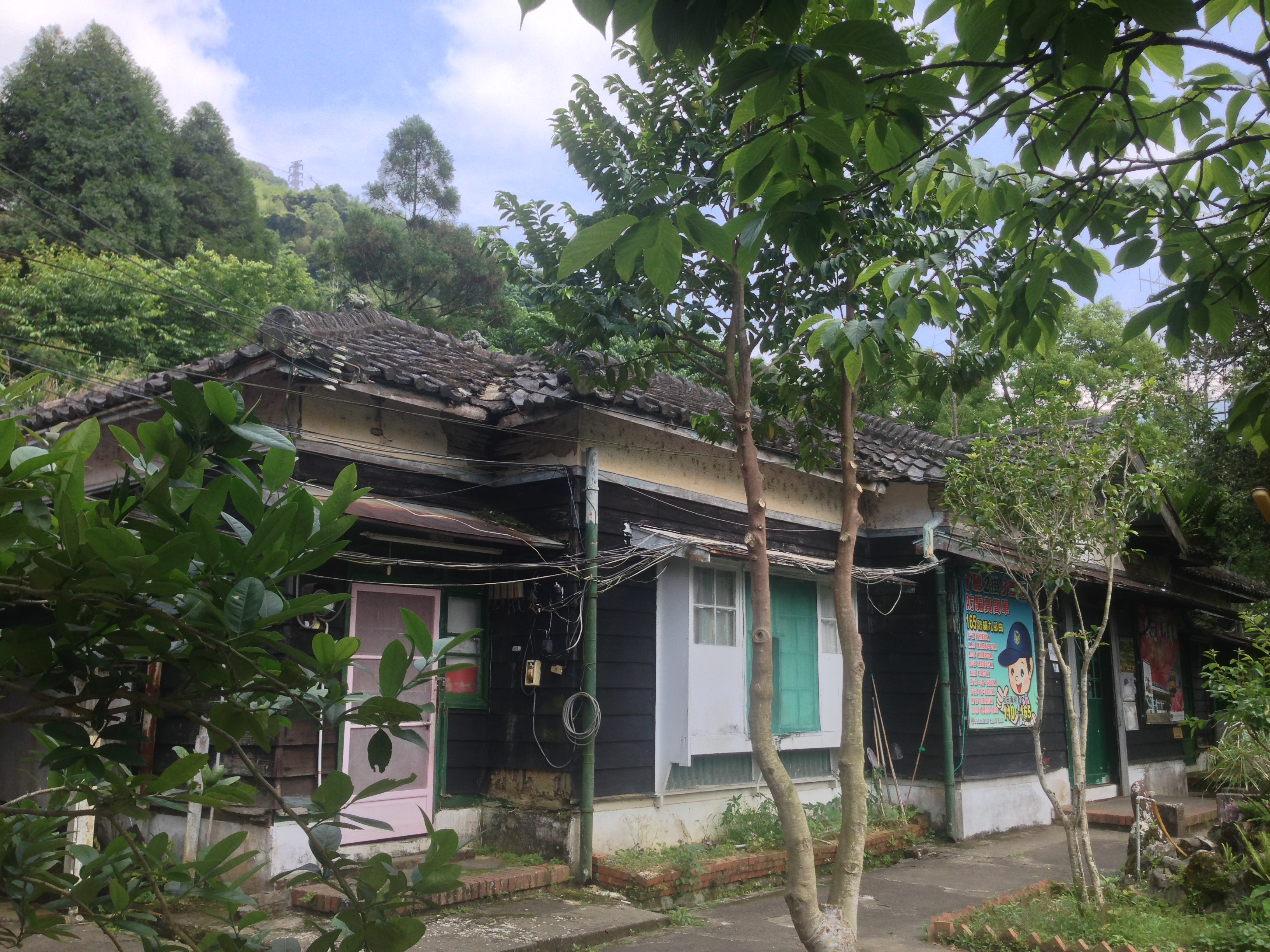 新竹縣政府警察局橫山分局內灣派出所，地址：新竹縣橫山鄉內灣村4鄰141號。